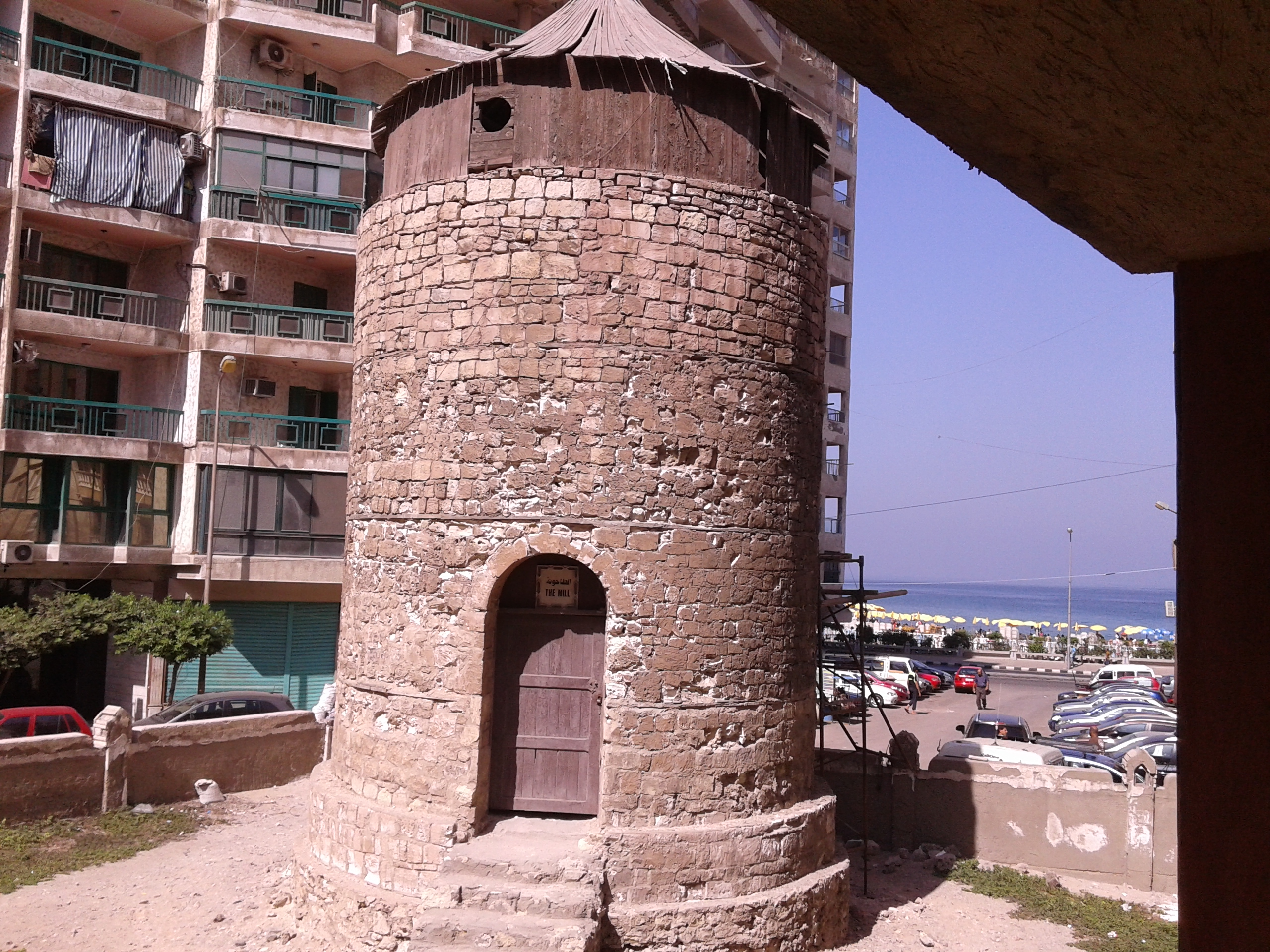 الوضع الامامى للطاحونة